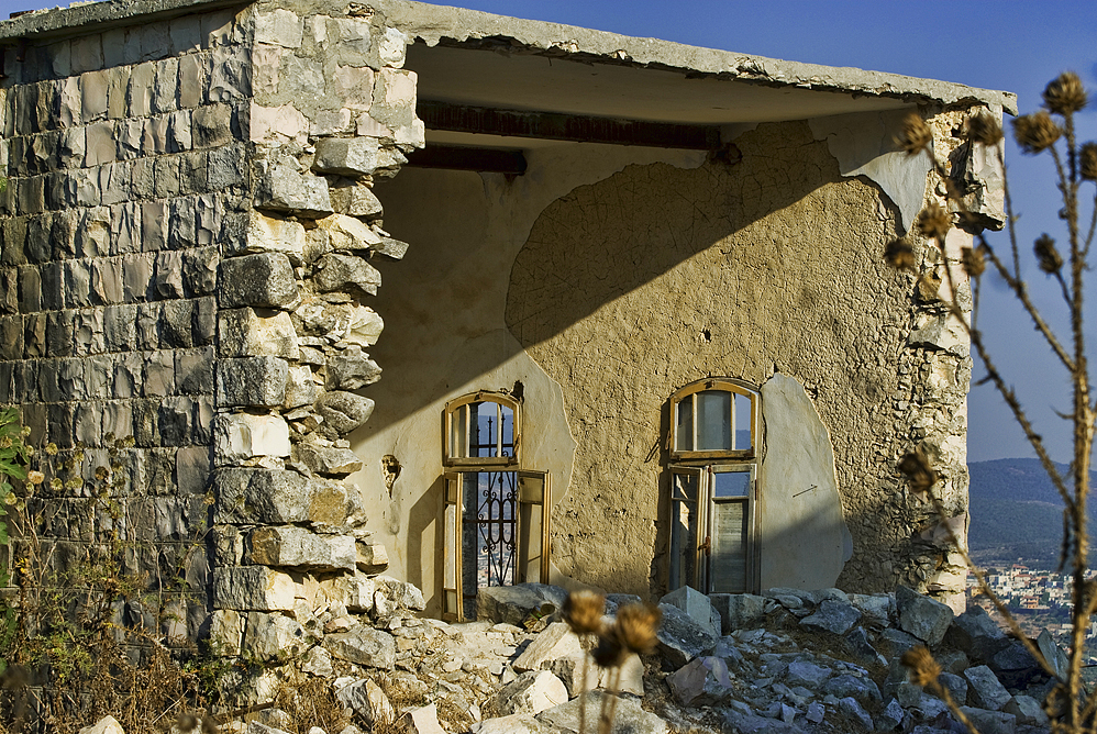 בתים עתיקים על רקע נוף גלילי מרהיב